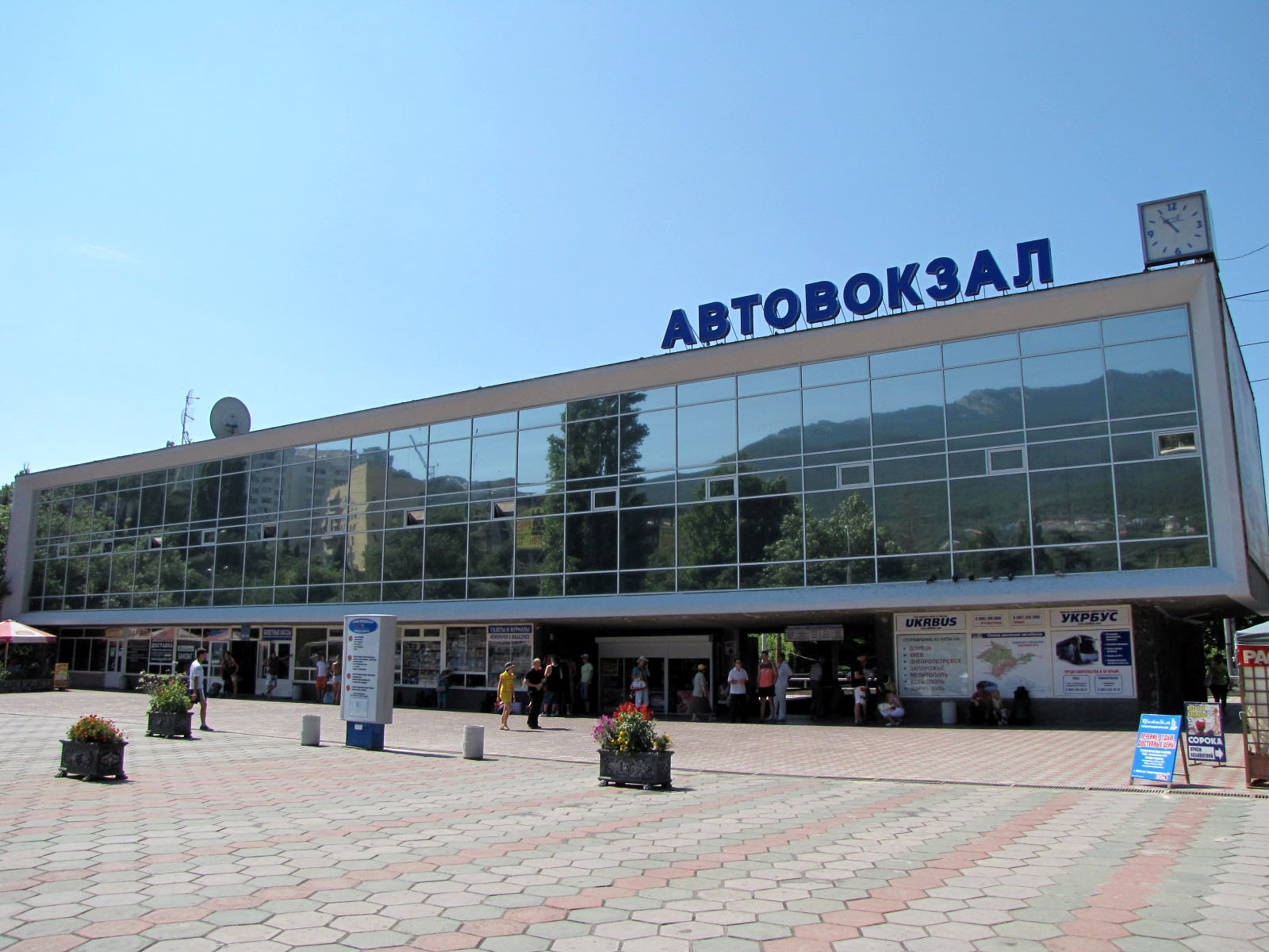 Автовокзал в Ялте